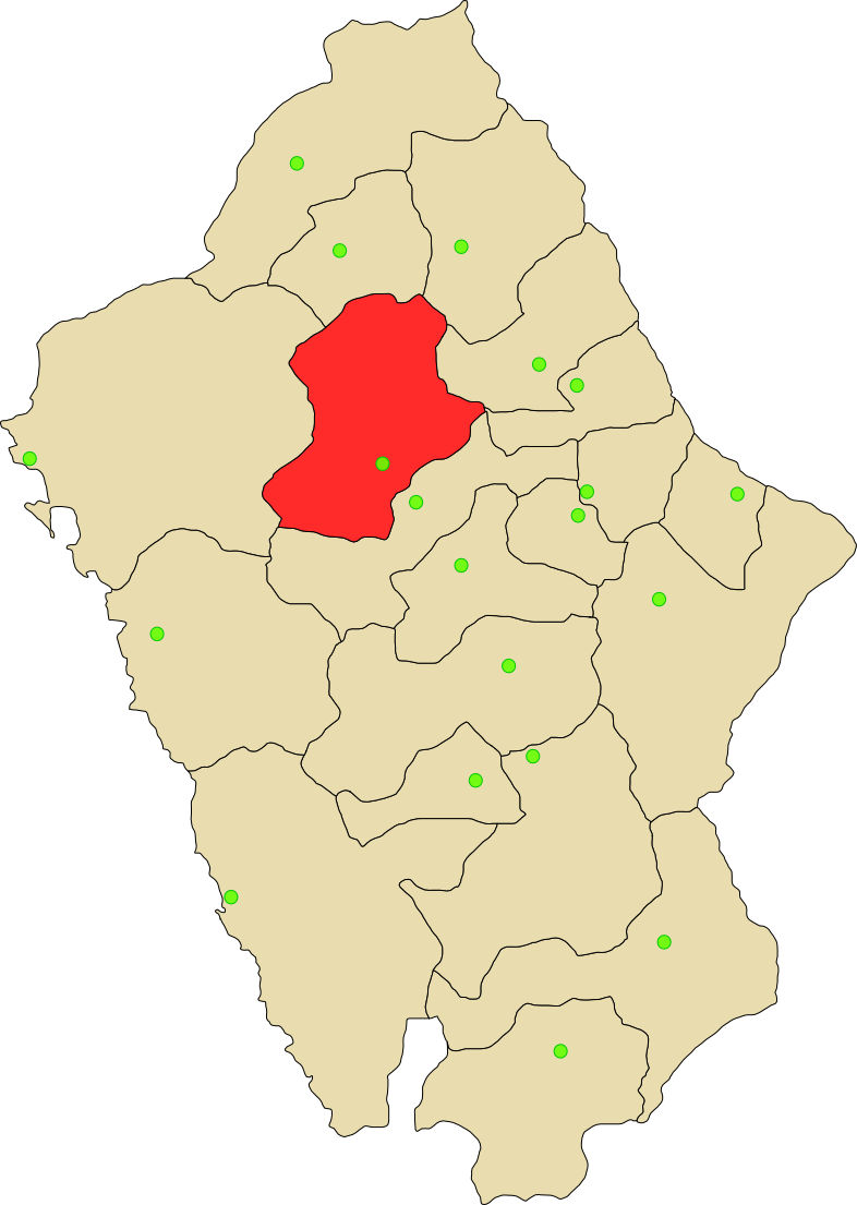 Provincia de Huaylas de departamento Ancash